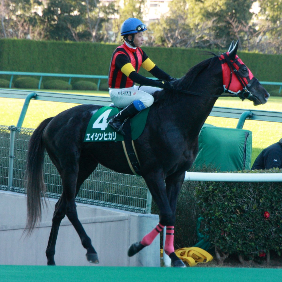 2014年12月13日、第65回チャレンジカップ